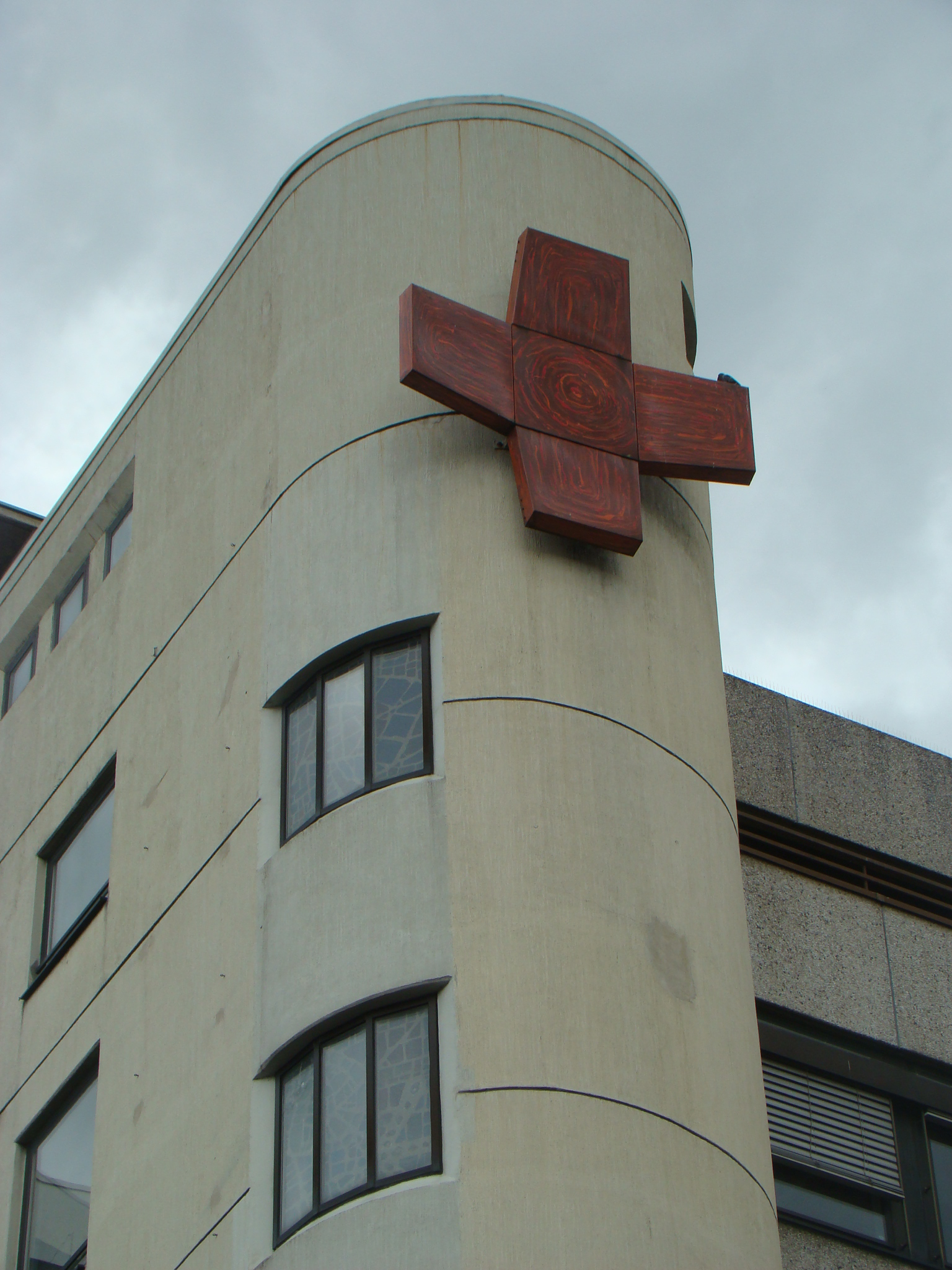 Heilbronn, Detail der (ehem.) Pauluskirche an der Karlstraße